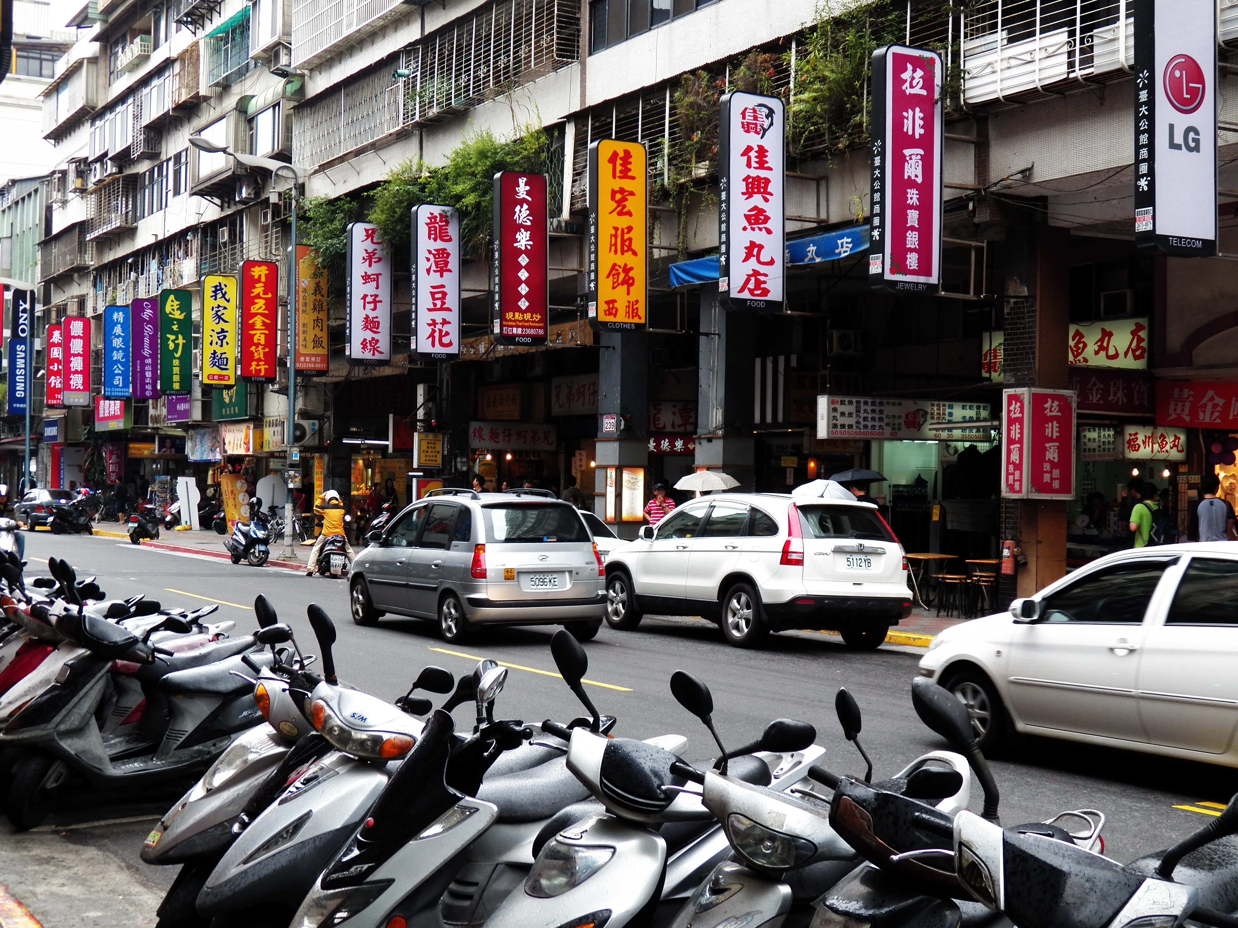 臺北市中正區汀州路三段239號公館商圈。